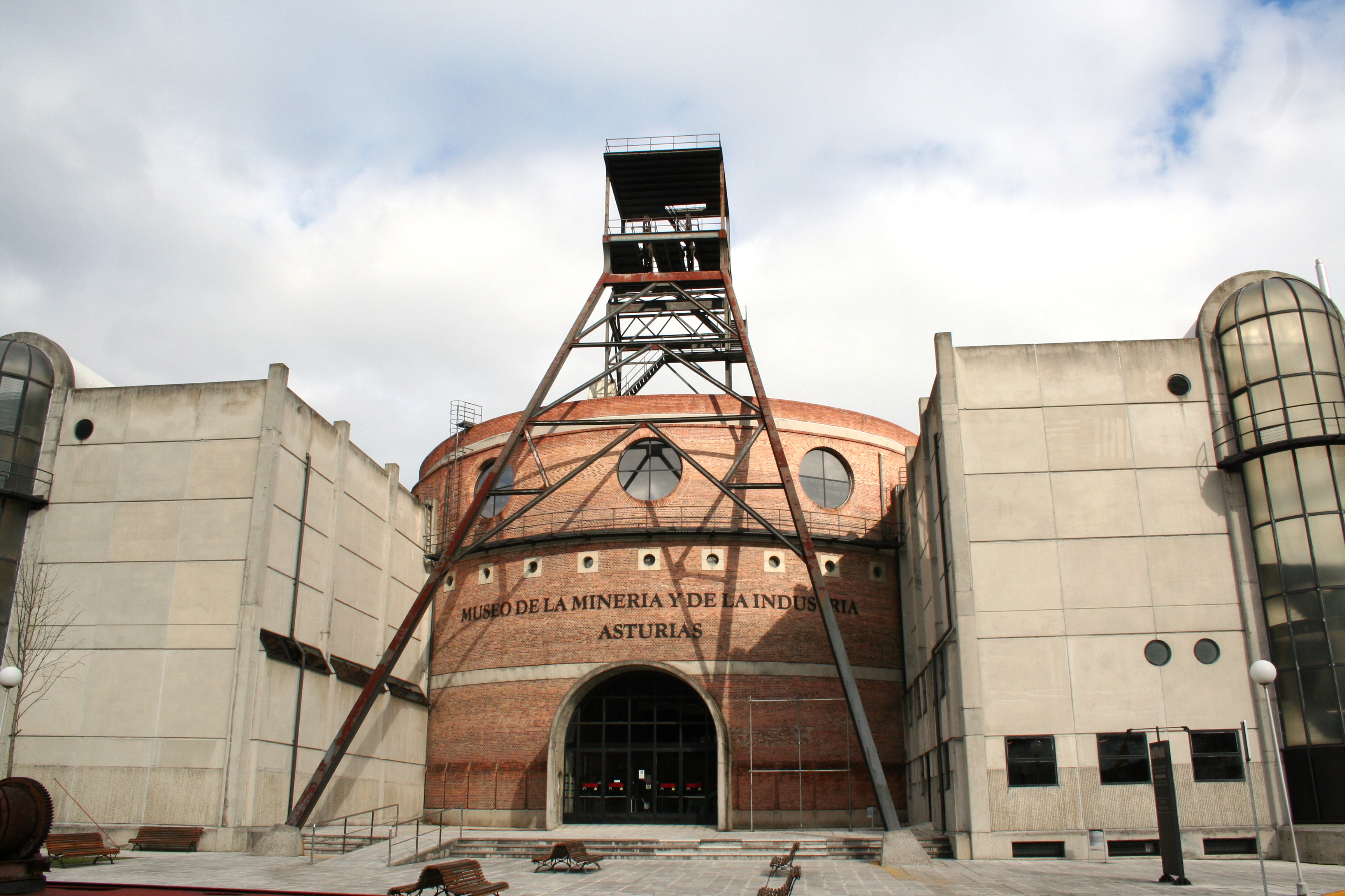 Muso de la minería y de la industria de Asturias